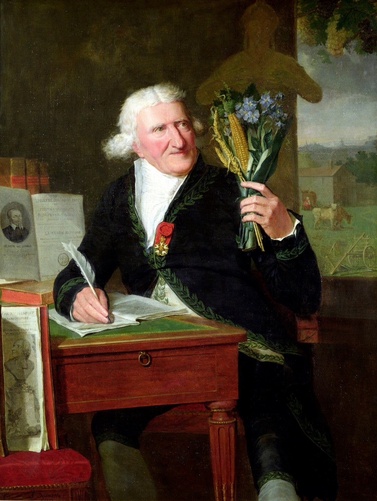 Portrait en habit d'académicien portant la Légion d'Honneur